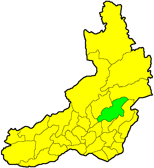 Сретенский район на карте Забайкальского края